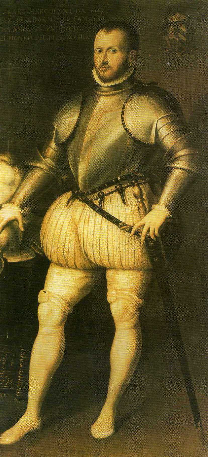 perkele